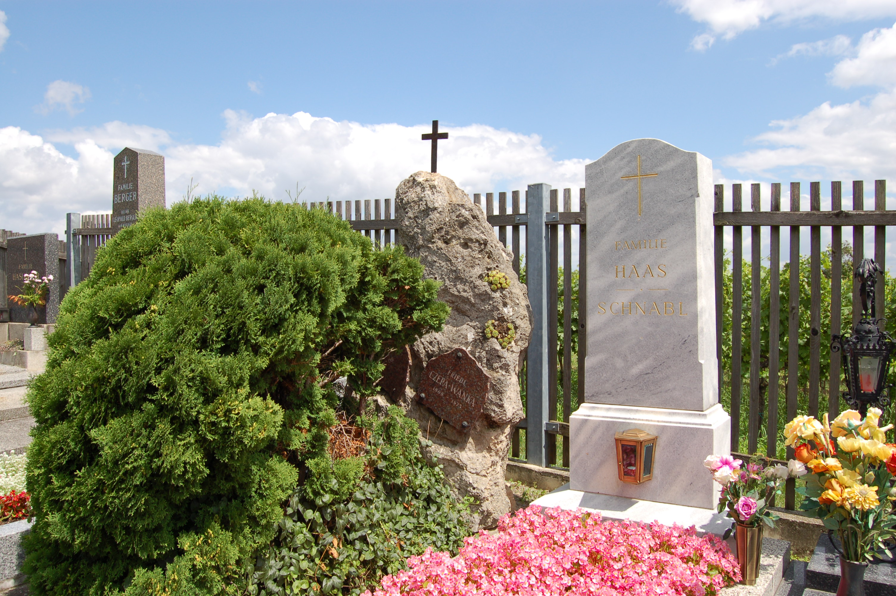 Friedhof Stammersdorf-Ort, Grab von Friedl Czepa, Schauspielerin